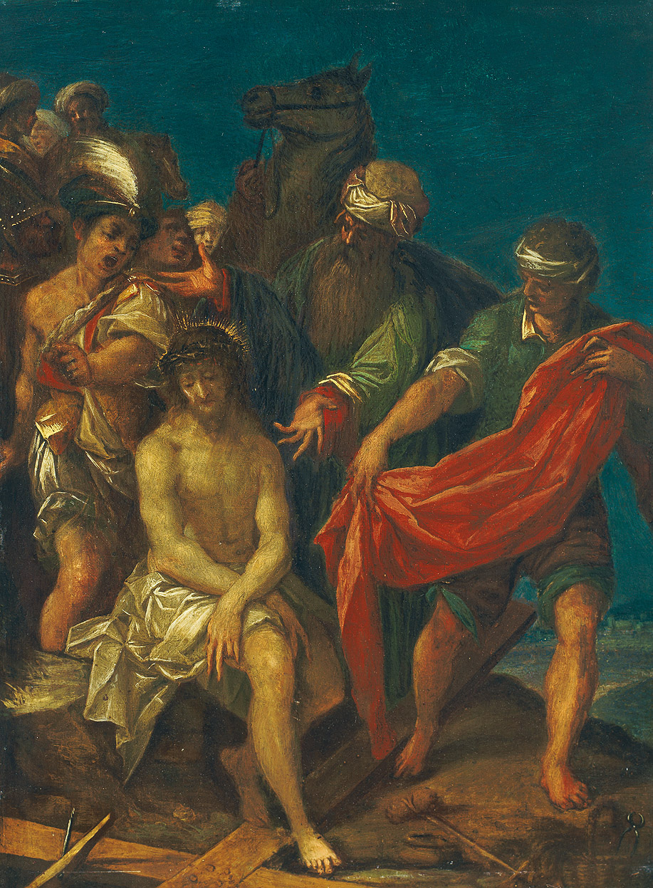 Christus in der Ruh (Christus in der Rast), Augsburg, 17. Jh., Öl auf Kupfer, 28,5 x 21,5 cm